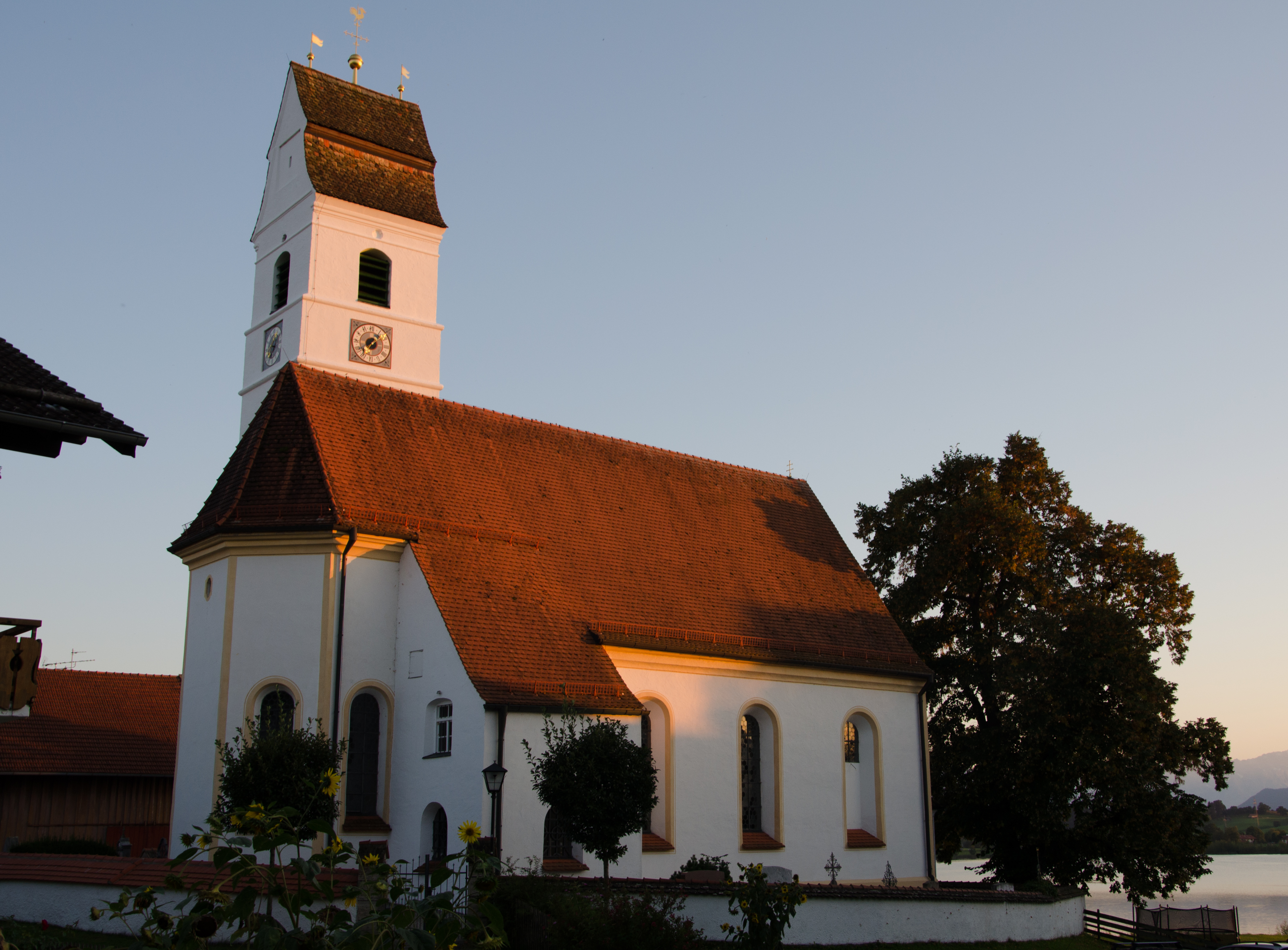 Im Kern spätgotisch, barockisierte Saalkirche mit eingezogenem Chor und südlichem Mansarddachturm, 2. Hälfte 15. Jh., 1. Hälfte 18. Jh. umgestaltet; mit Ausstattung; Friedhofsmauer, verputzt, wohl 18. Jh.This is a photograph of an architectural monument.